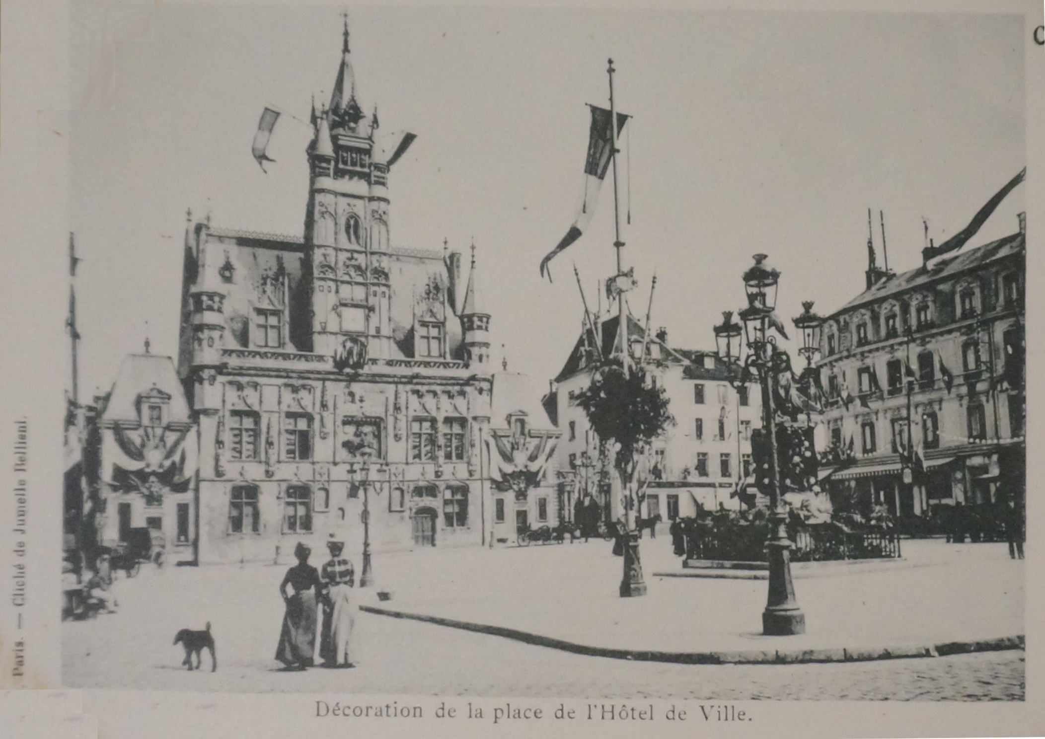 lors des Grandes maoeuvrves de l'est de 1901. BM Reims cote CPA t4. Publication de 1901 en cartes postales.